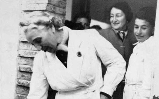 Olga Cossettini recibe una Beca Guggenheim en 1941.